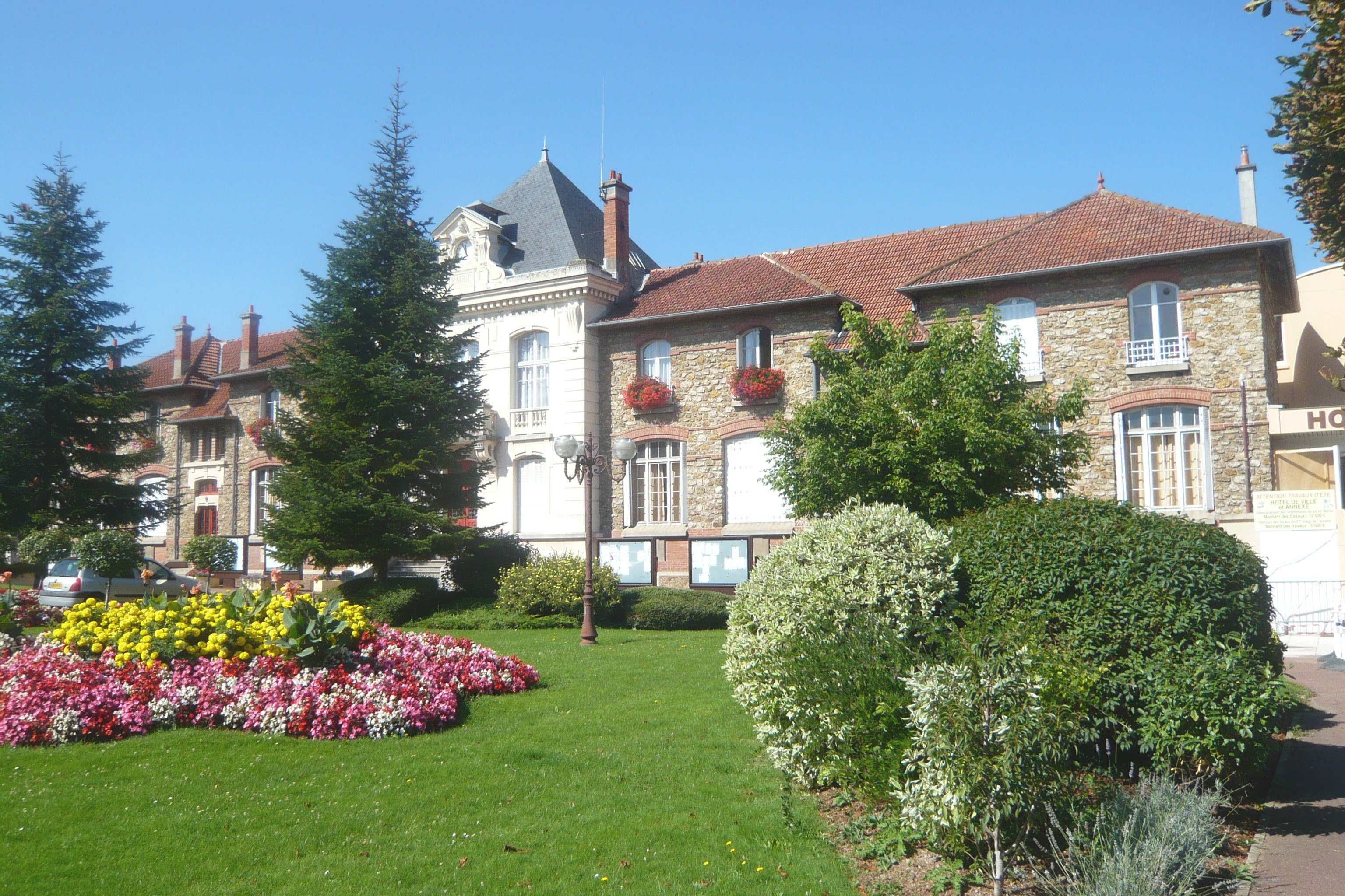 Mairie de Morsang-su-Orge